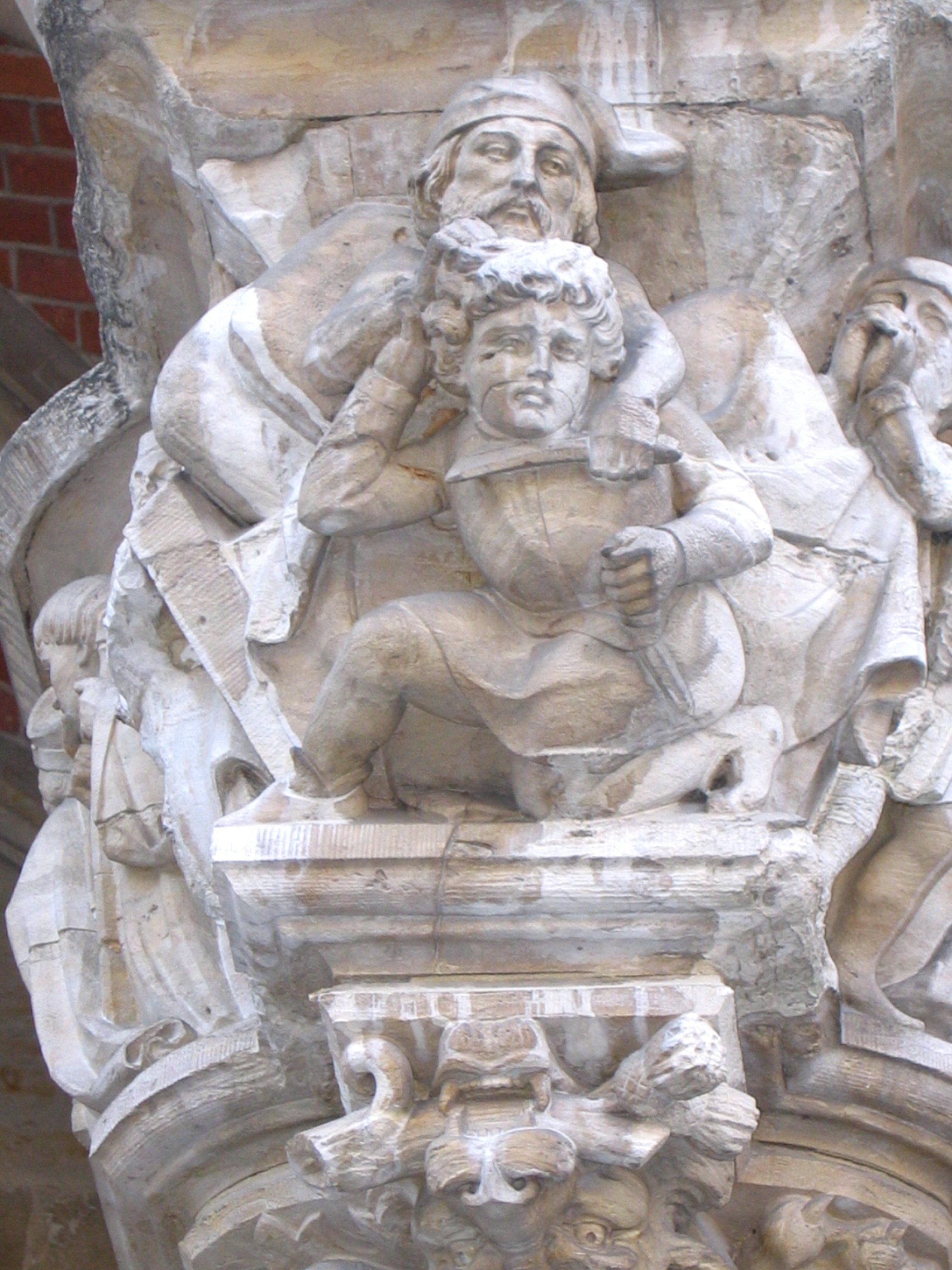 Brussels Town Hall. Hôtel de ville de Bruxelles: cul-de)four de l'aile gauche : légende d'Herkenbald